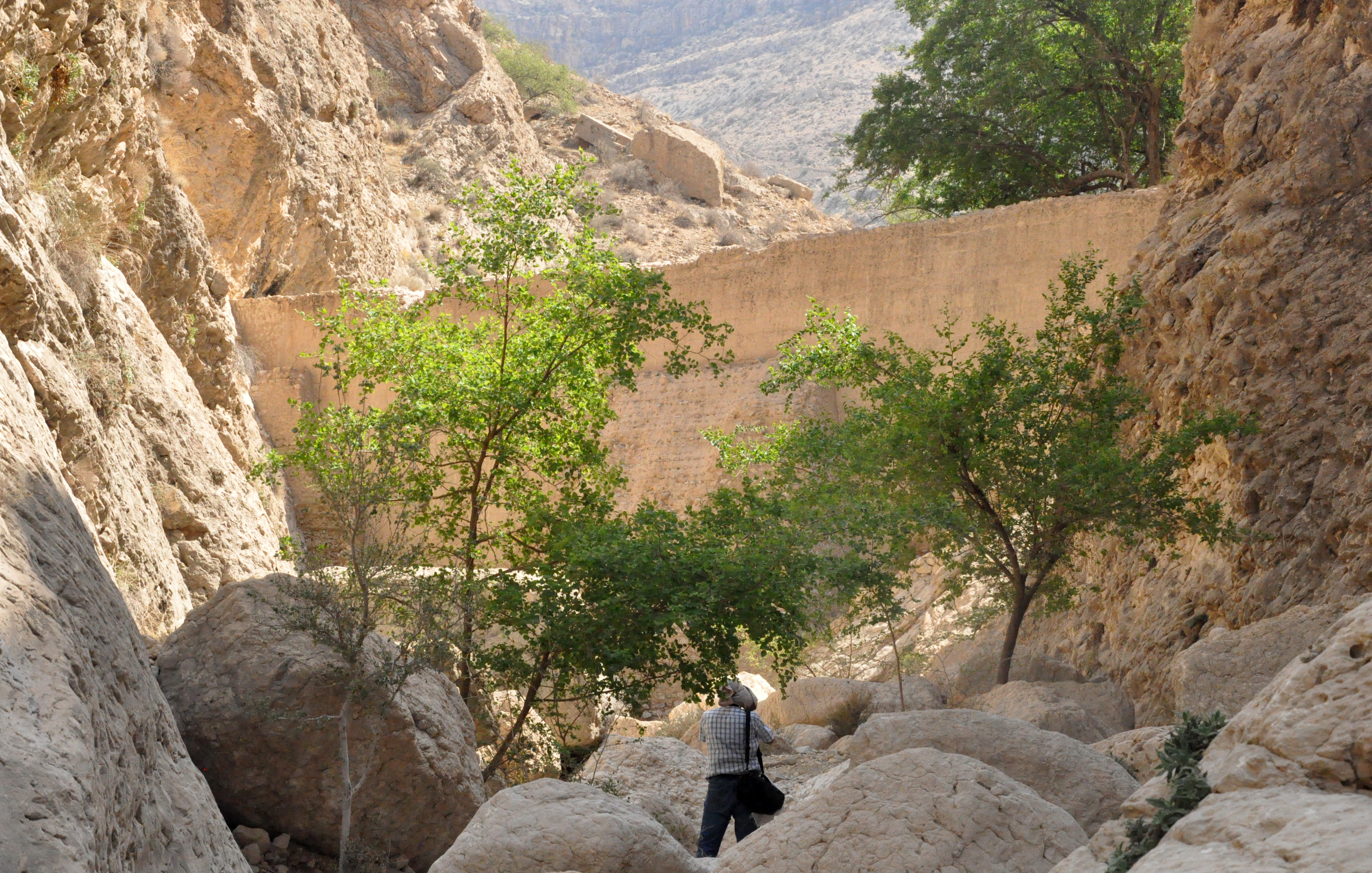 سد تاریخی تگ آو،گراش،فارس،ایران عکس از حامد عبدالهی